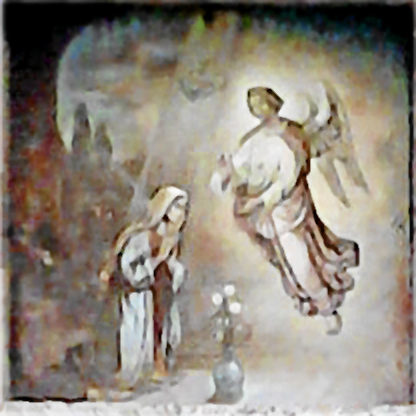 Bildtafel des Bildstocks I der Geheimnissäulen auf dem Weg nach Maria Plain.